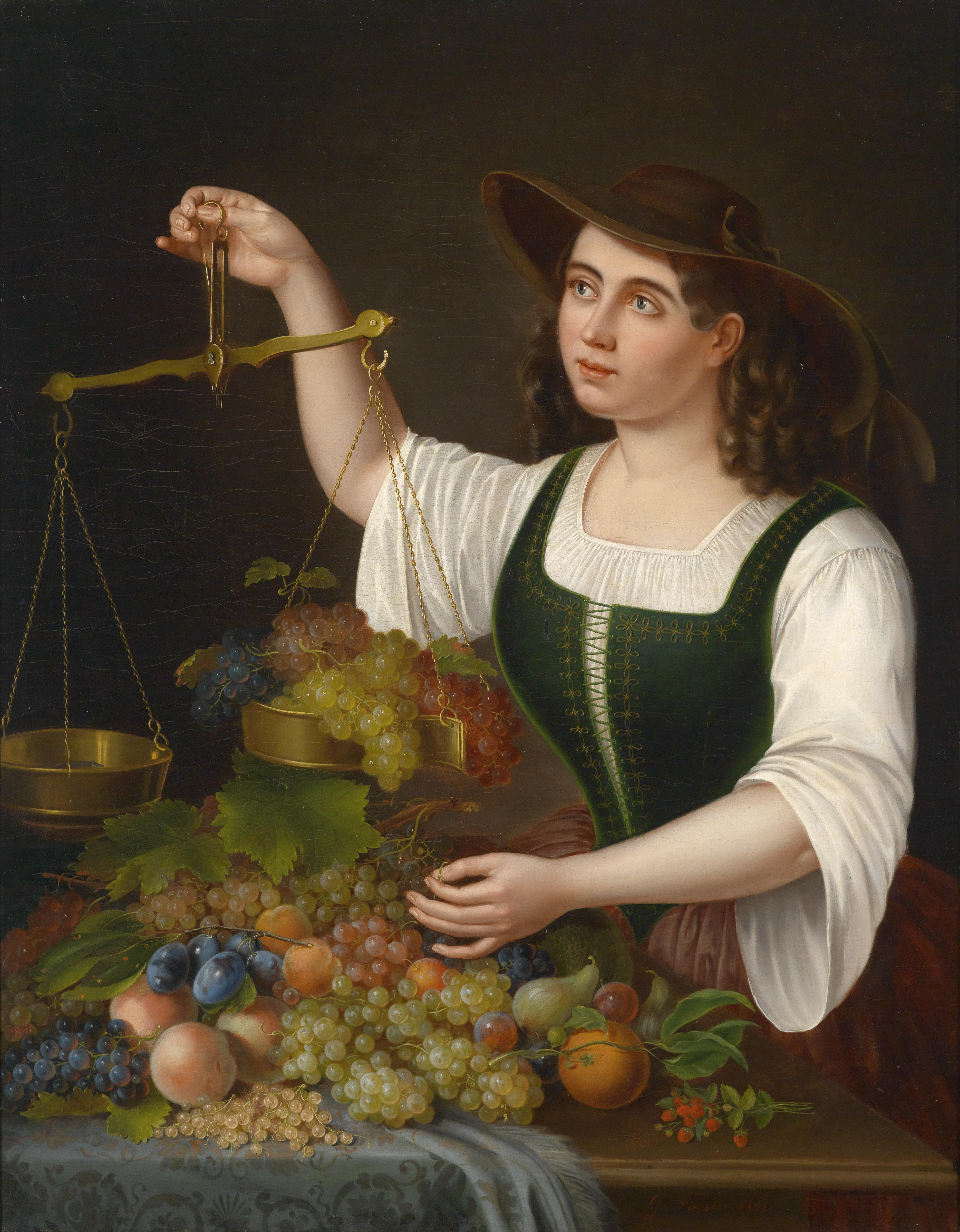 Eine junge Marktfrau beim Abwägen von Früchten, signiert, datiert G. Forster 1861, Öl auf Leinwand, 109,5 x 85 cm